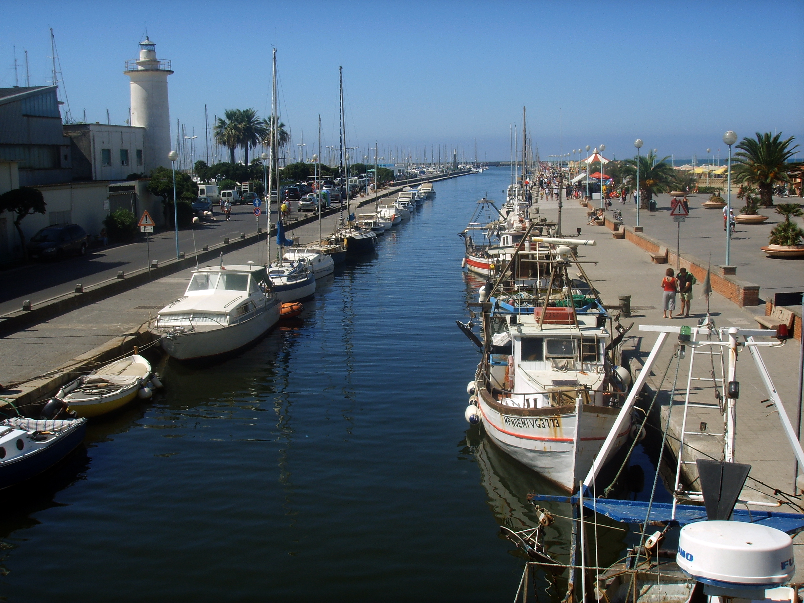 Viareggio, canale la_burlamacca